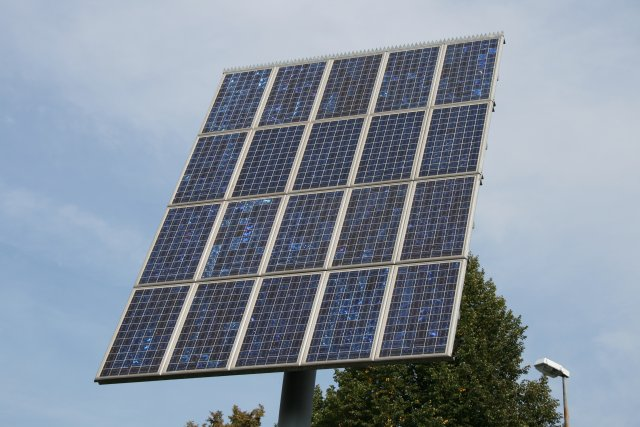 Freistehendes Photovoltaikpaneel